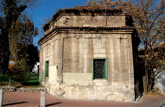 турбе Шеих Мустафе, С.Неговановић